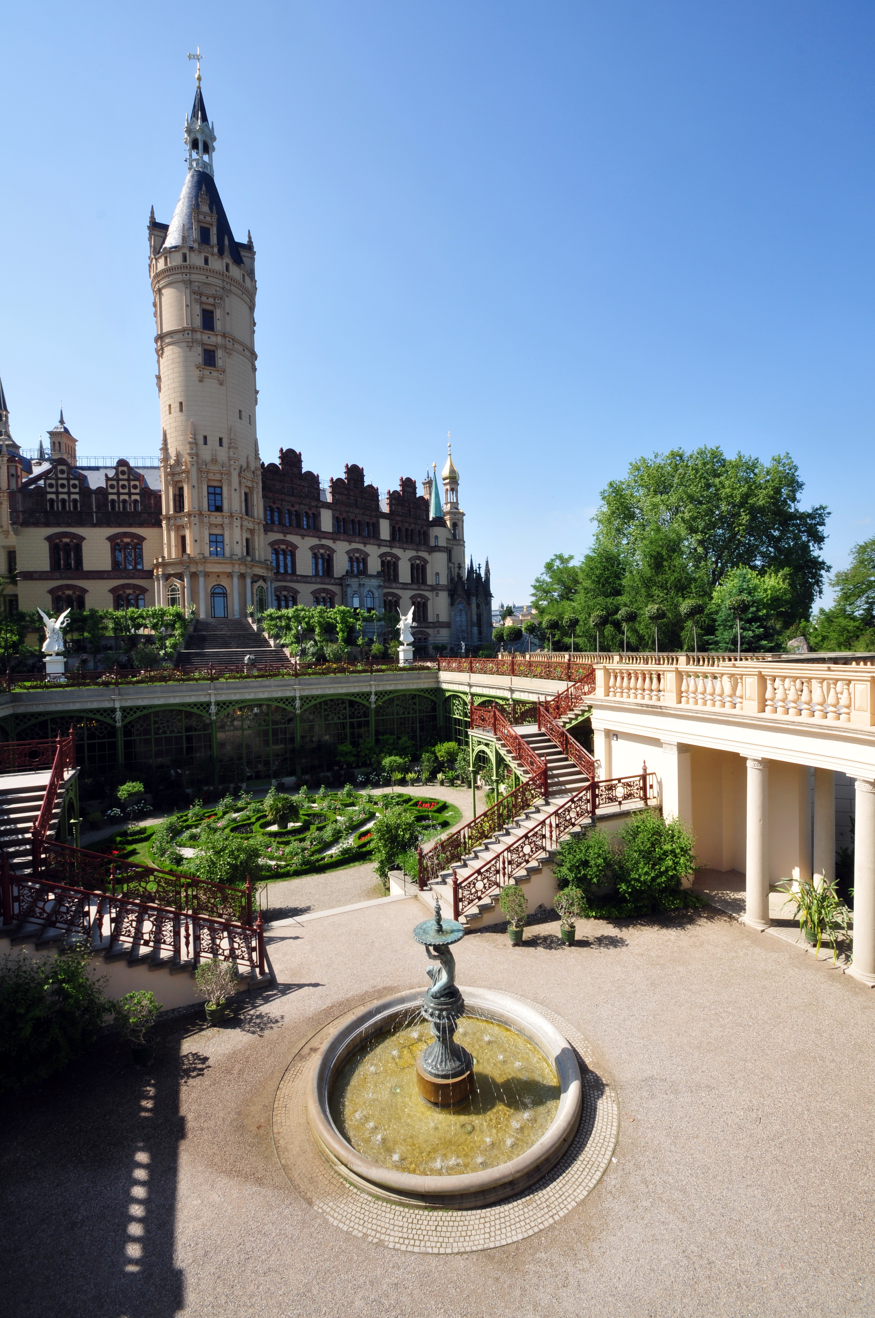 Schweriner Schloß; Orangerie und Schloßgarten